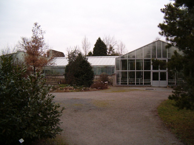 Botanischer Garten Dresden, Greenhouse Picture taken by: User:BotBln Date: 2007 02 19